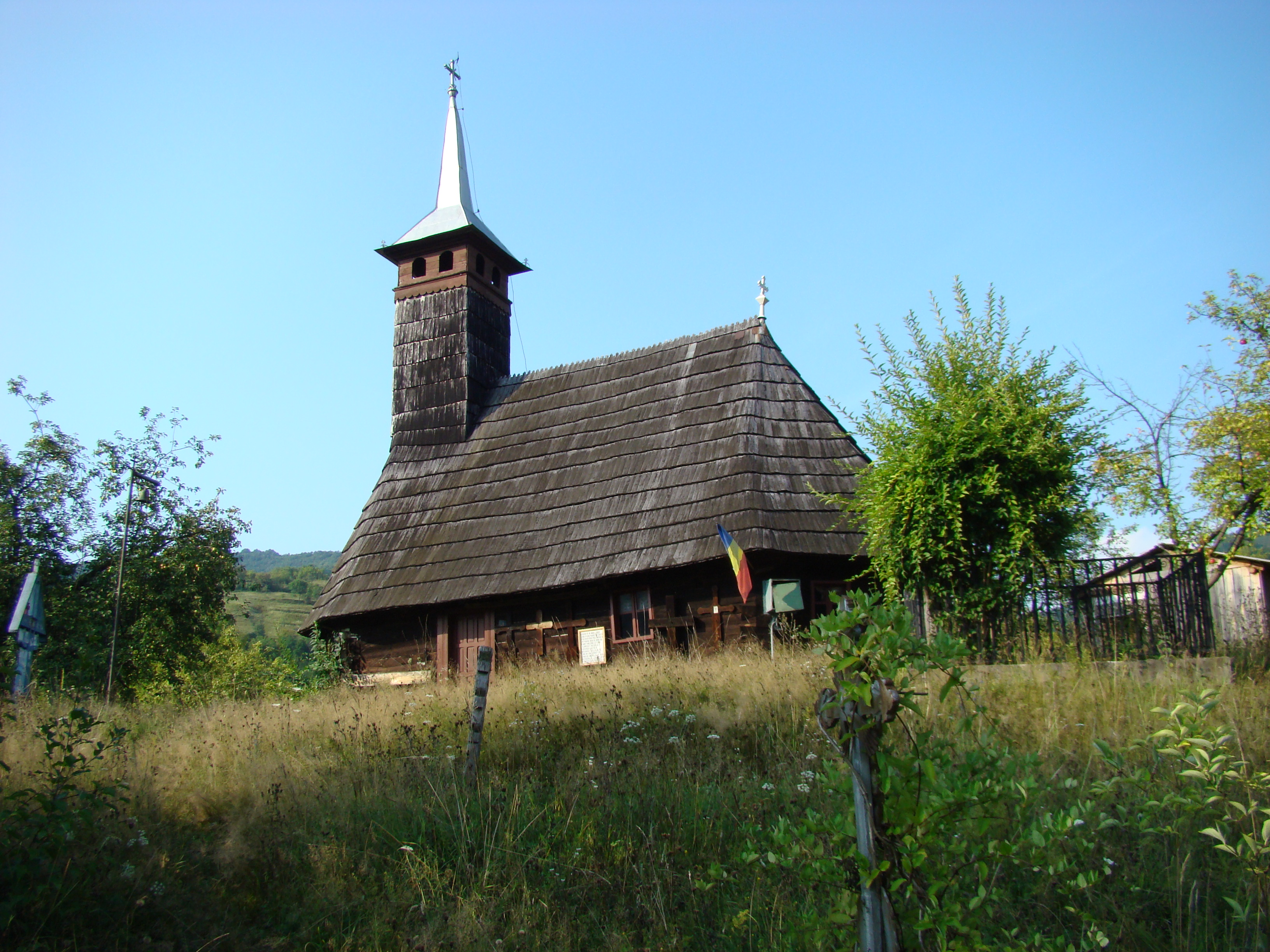 Biserica de lemn „Înălțarea Domnului” din Micănești-Hunedoara